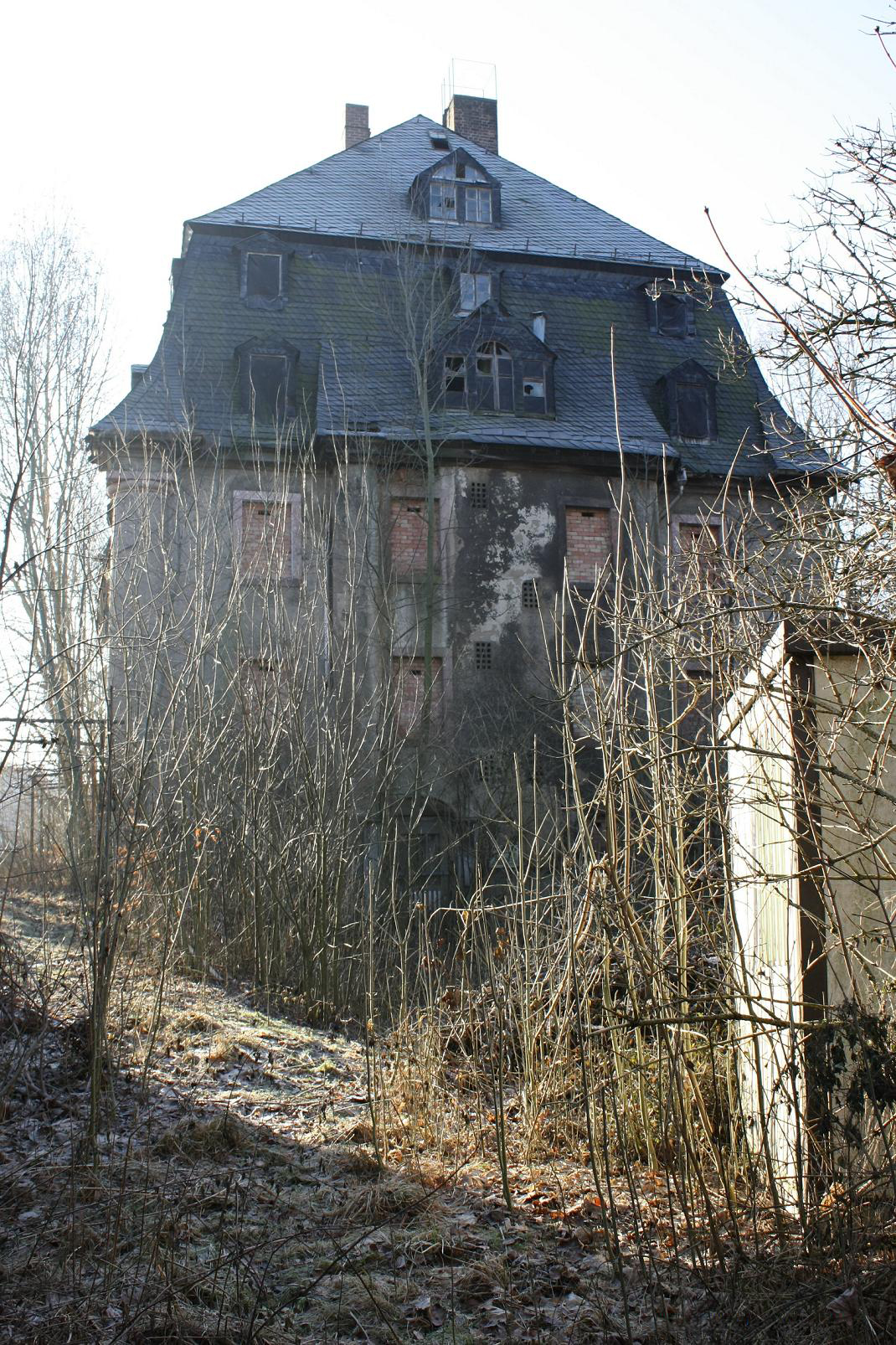 Spinnmühle Meinert in Lugau/Erzg.